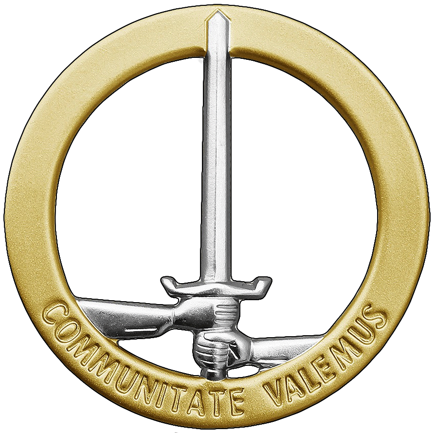 Barettabzeichen des Deutsch – Niederländisches Korps der Bundeswehr Barettfarbe: Marineblau Maße: Durchmesser: 50mm Ausführung: silberfarben mit goldfarbenem Rand, Metall